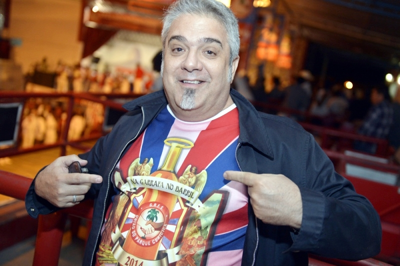 Final da disputa de samba-enredo na União do Parque Curicica. Foto: Ricardo Almeida.